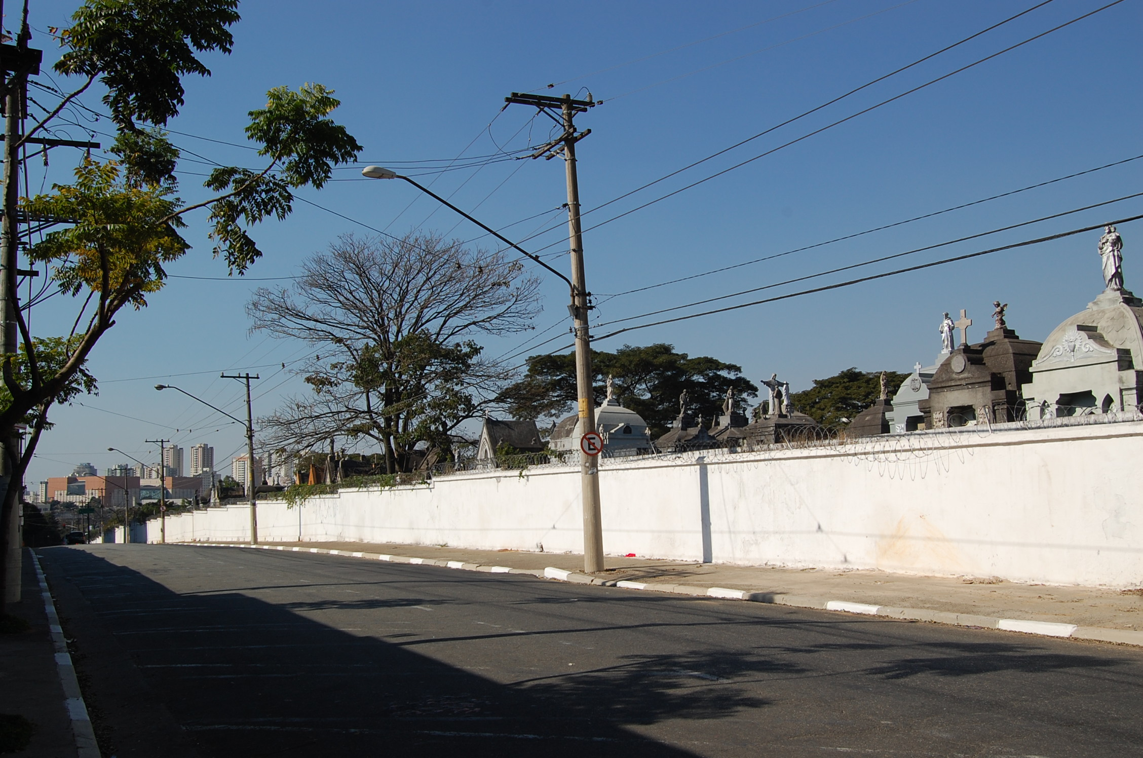 O Cemitério da Quarta Parada; visto de seu lado norte, cujo acesso se dá pela rua Tobias Barreto. (Belenzinho/Mooca, São Paulo, Brasil). Ao fundo vê-se o Shopping Boulevard Metrô Tatuapé.